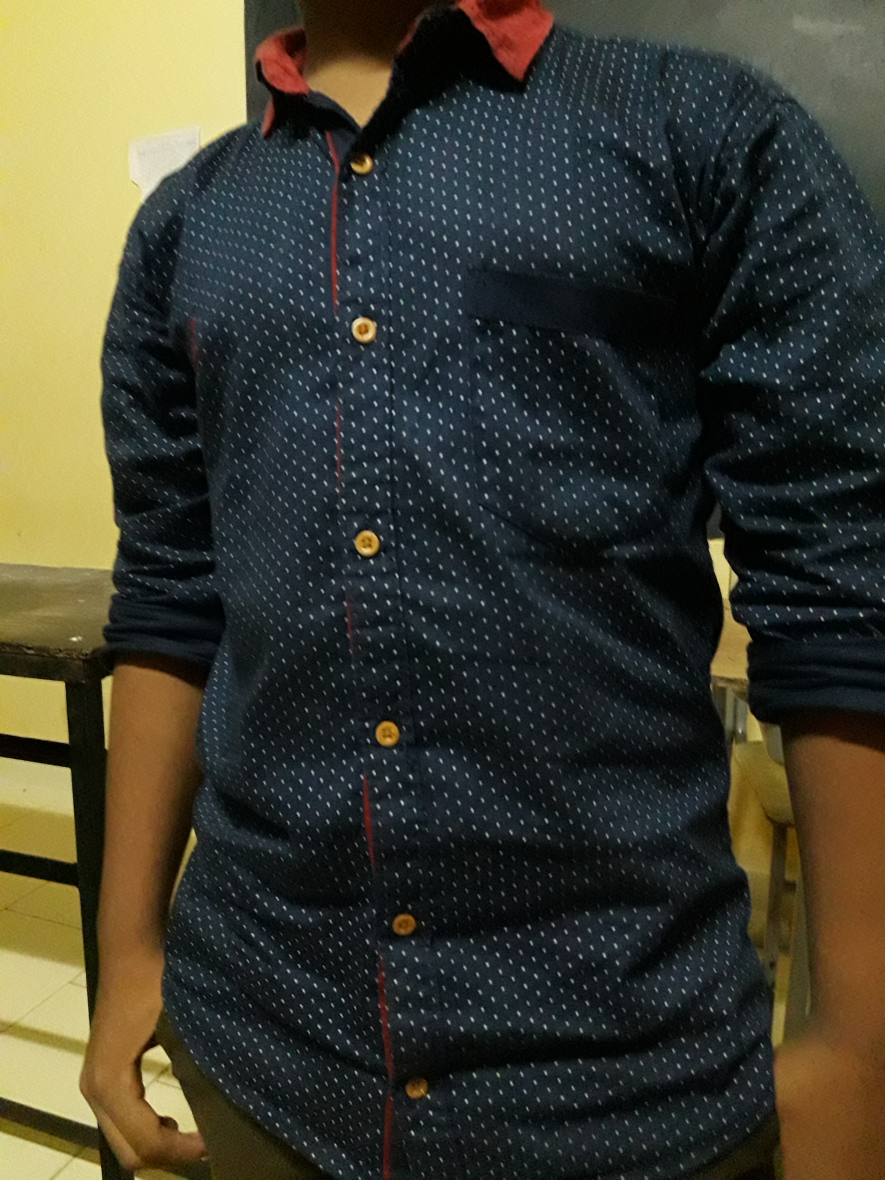 shirt